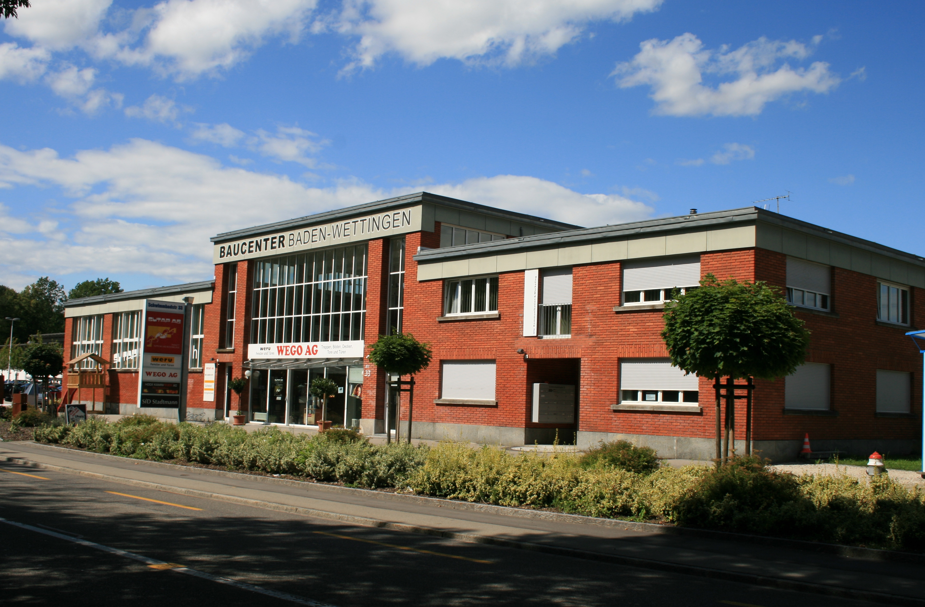 ehemaliger Schlachthof Baden, Gemeinde Wettingen